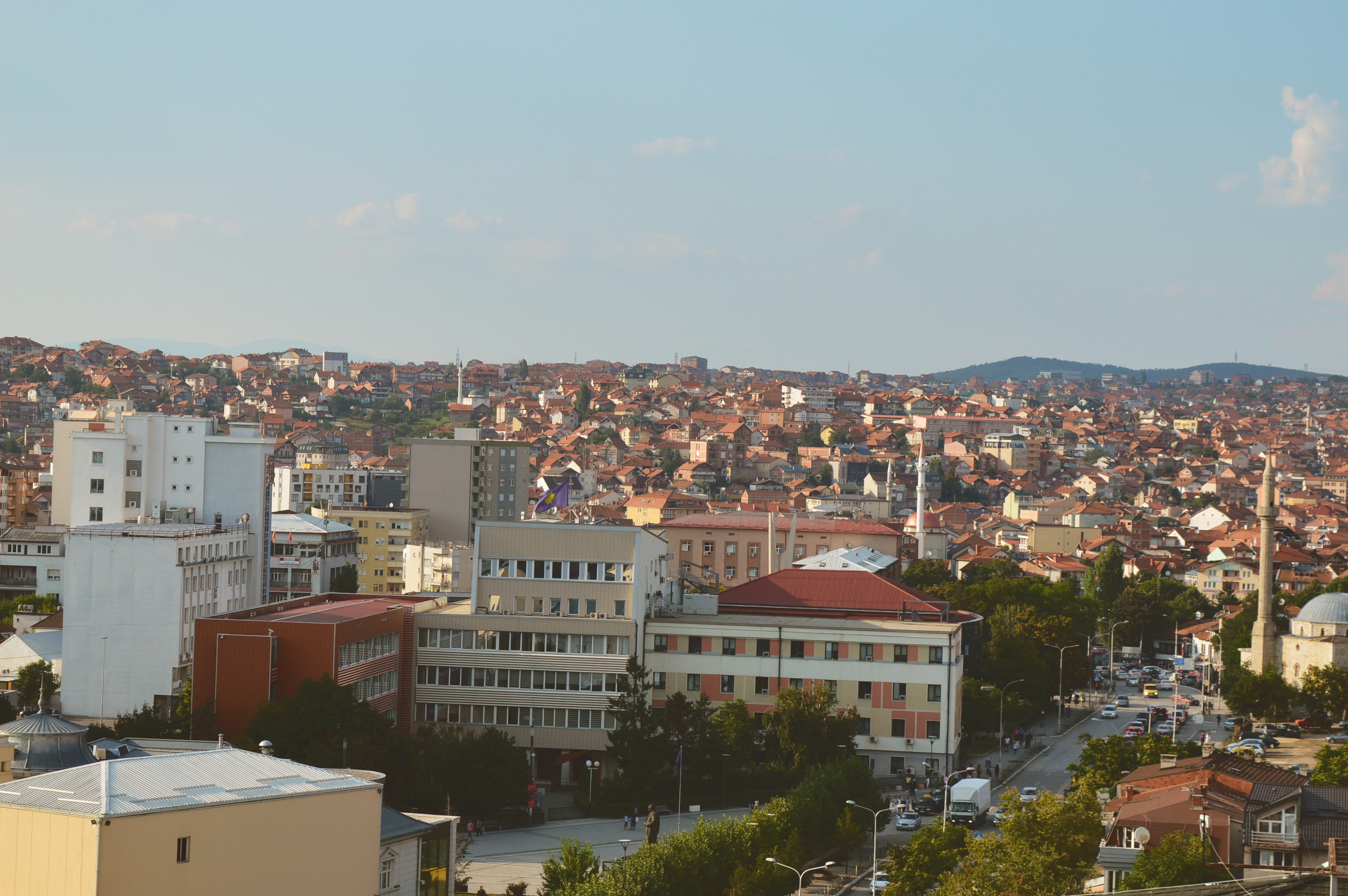 Nje Pamje e bukur nga Hoteli Sirius.